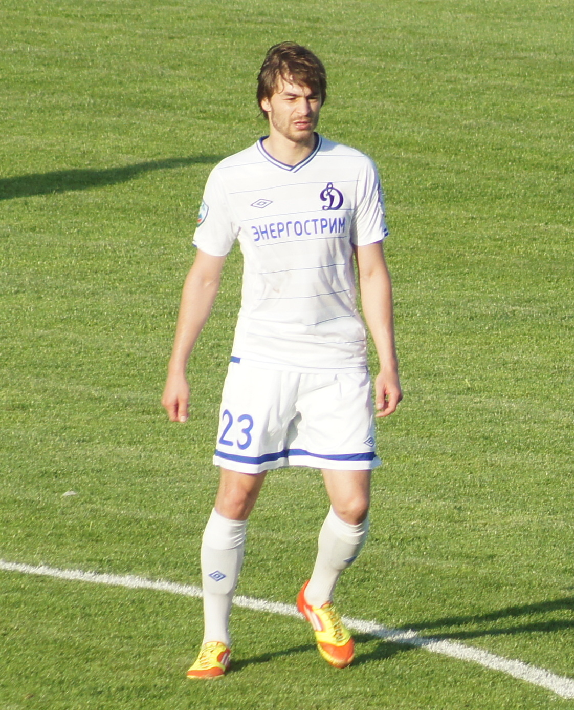 Рустем Калимуллин в Динамо (Брянск) 2012 г.